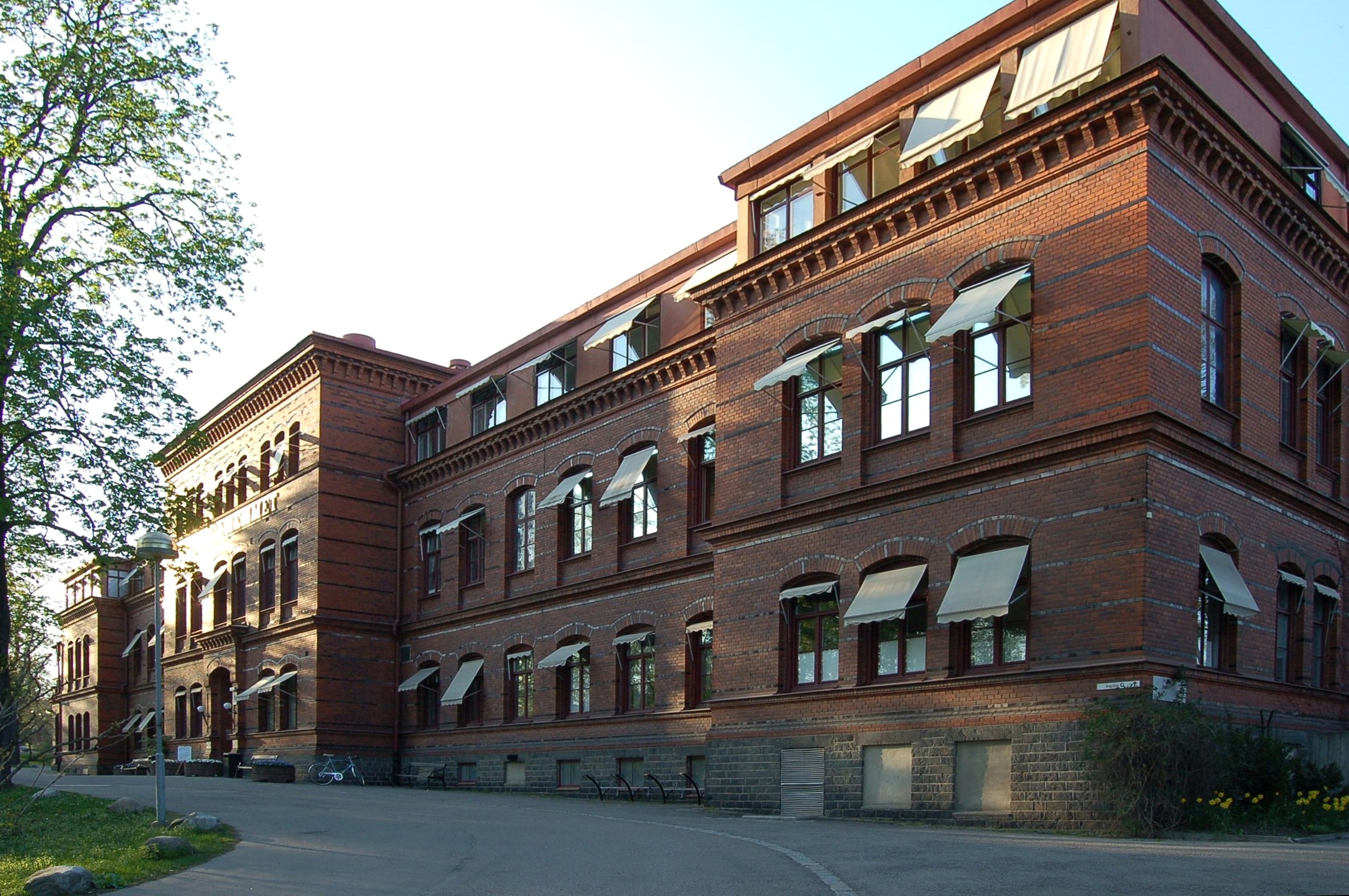 Sophiahemmets entré från öst.